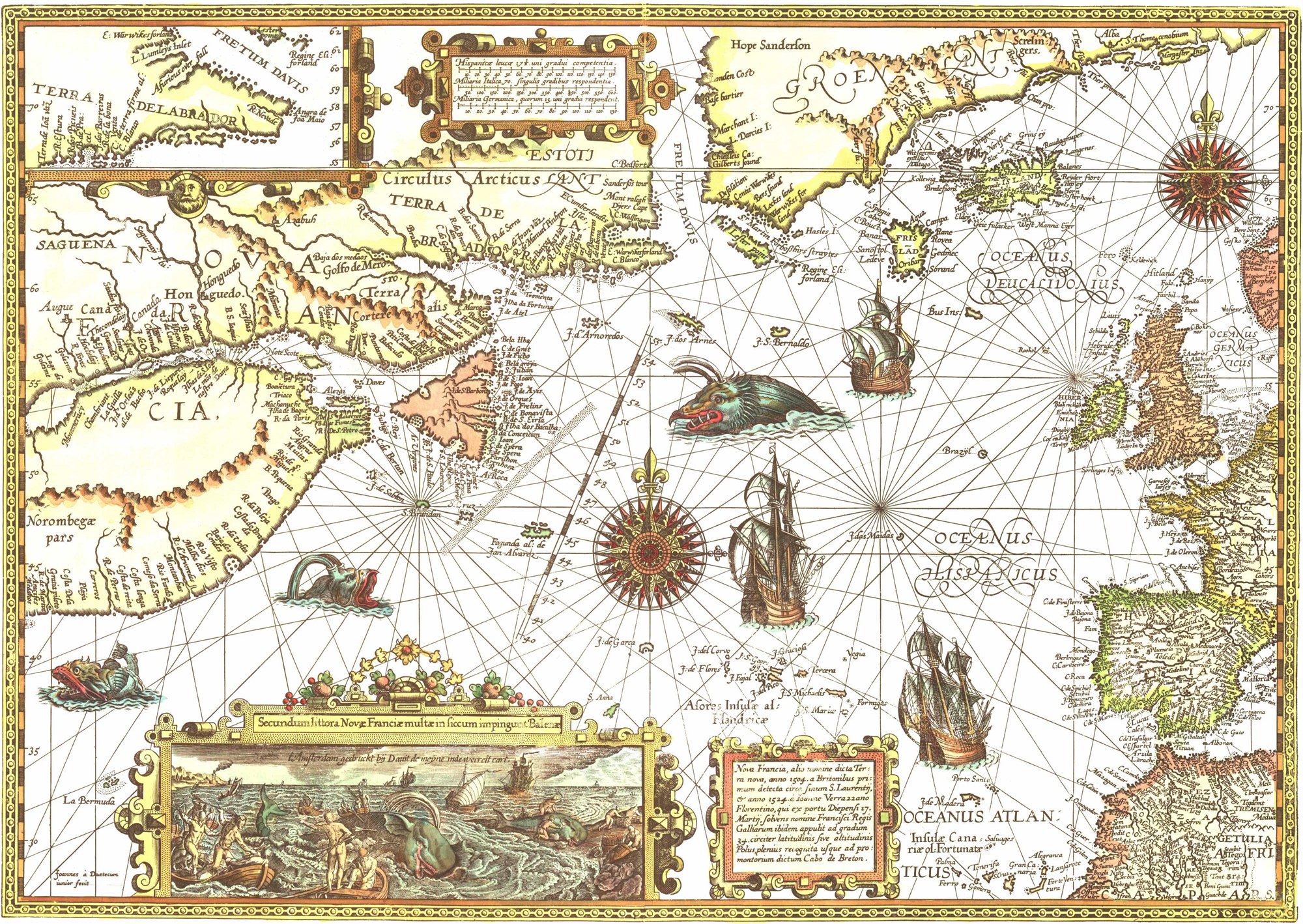 Nova Francia alio nomine dicta Terra Nova; size=36,5x52,5cm